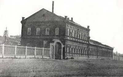 Zavod Benke